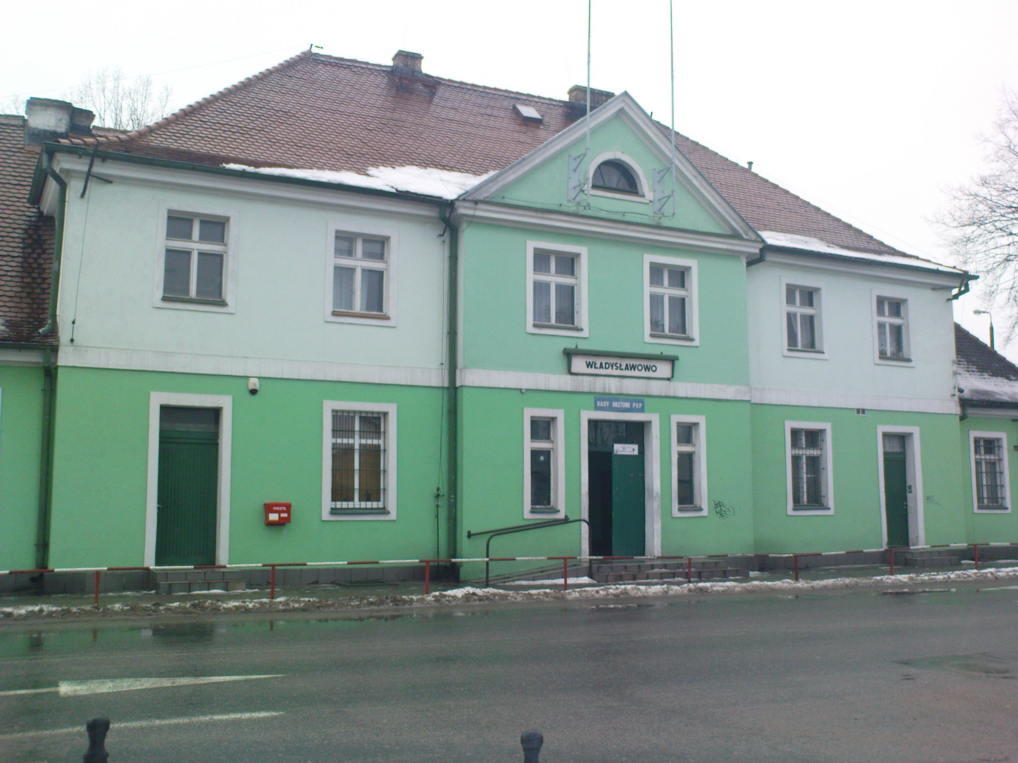 Dworzec PKP we Władysławowie.